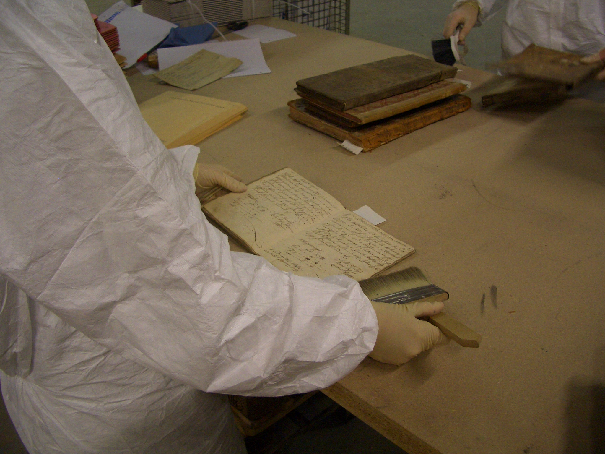 Arbeit des Teams des Hochschularchivs der RWTH Aachen im Erstversorgungszentrum des Stadtarchivs Köln April 2009